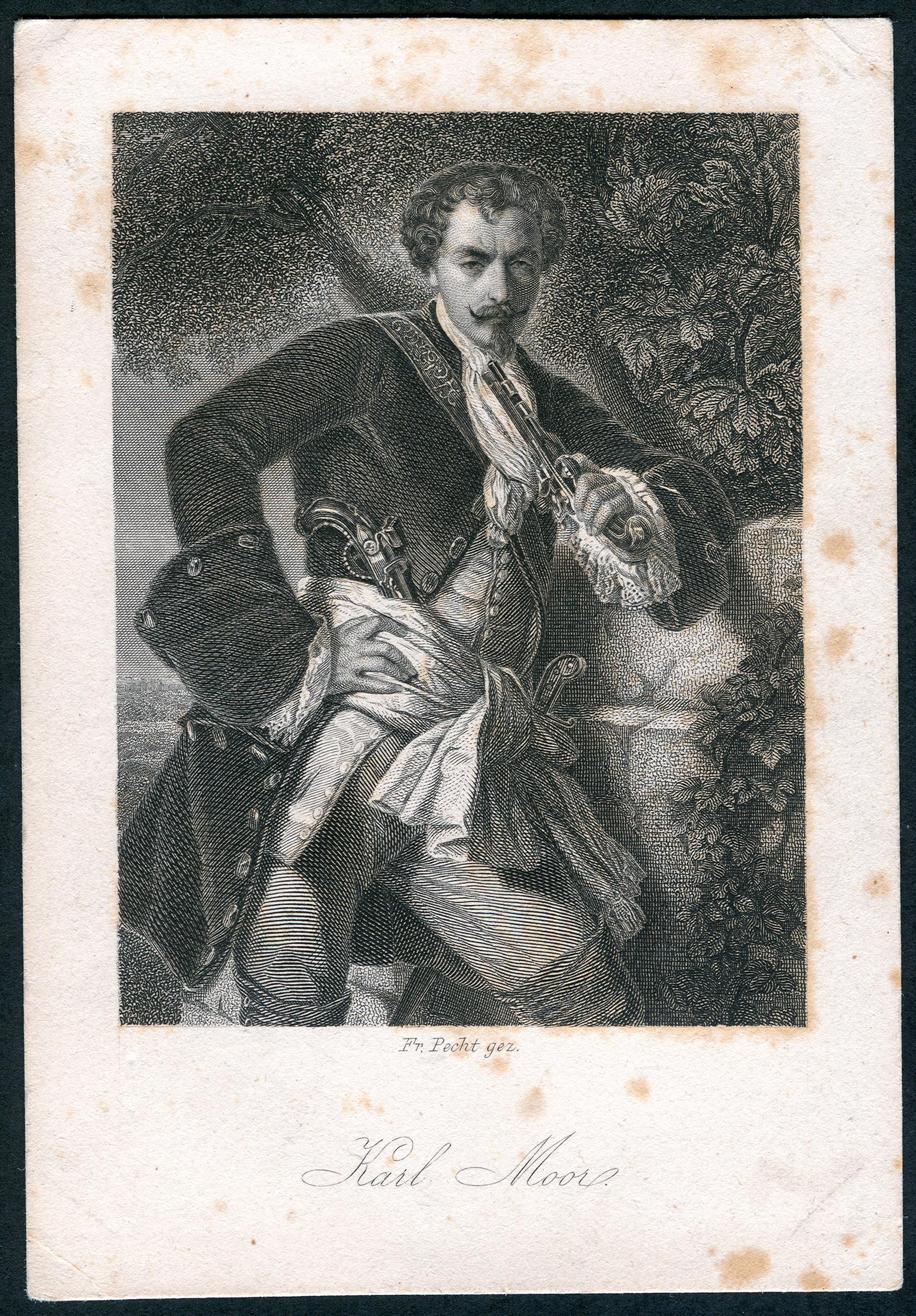 Karl Moor aus Friedrich Schillers Die Räuber, als Stahlstich gestochen von Lazarus Gottlieb Sichling um 1859 nach einer Zeichnung von Arthur von Ramberg; das untertitelte Blatt hat die Maße circa 8 cm x 11,6 cm und auf der Rückseite keine weiteren Angaben. Es gehört zu einer Serie, möglicherweise als frühes Sammelbild, die als Schiller-Galerie von Friedrich Pecht und von Arthur von Ramberg bekannt geworden ist.